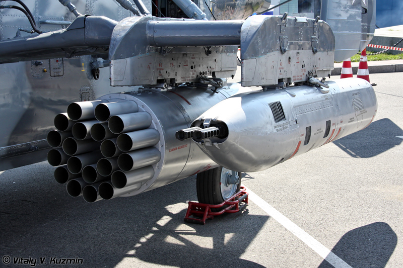 Ka-29